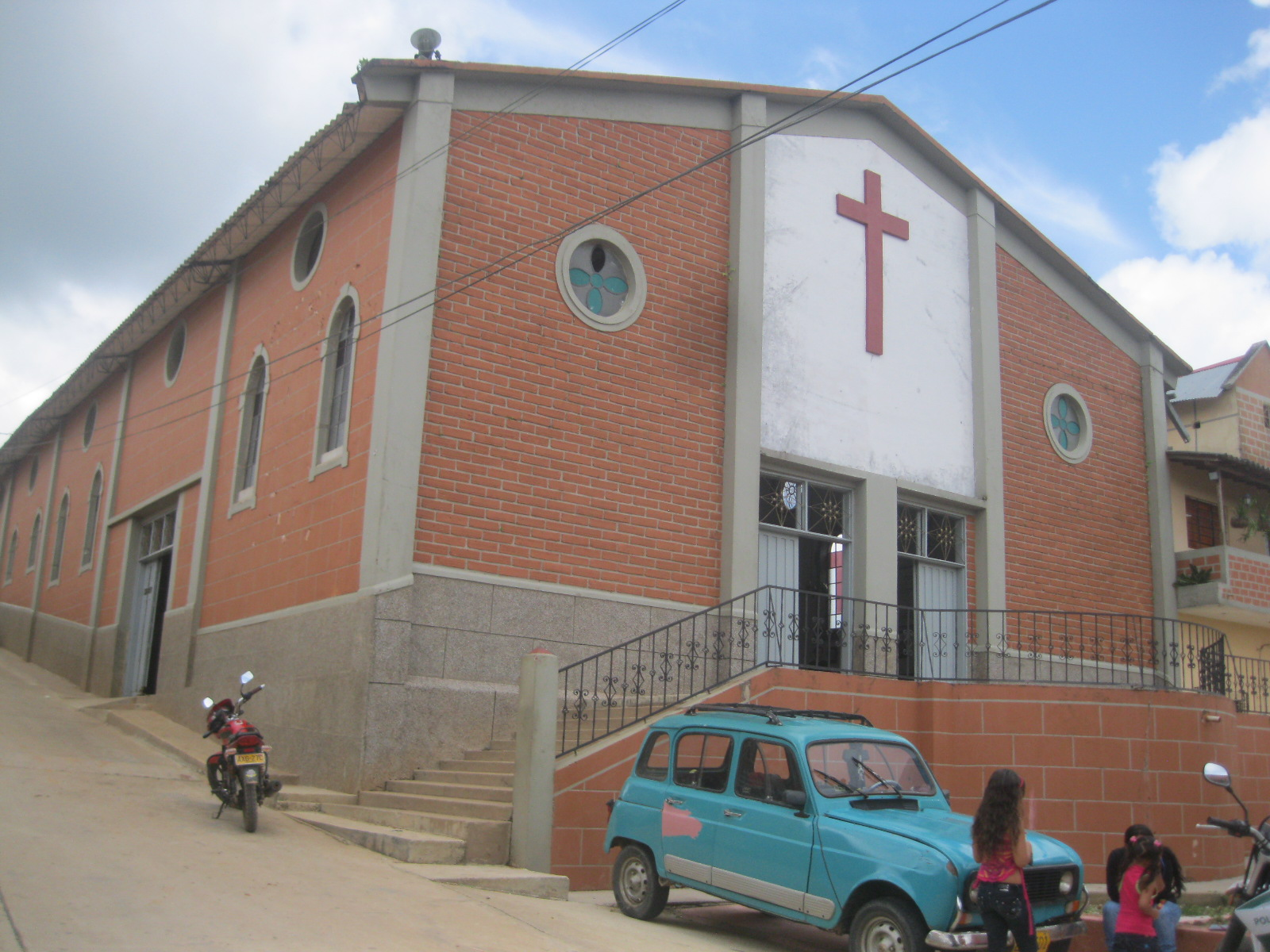 Localizado en la zona occidental centro del municipio, su área urbana tiene una conformación urbana lineal sobre la vía que conduce hacia el corregimiento El Tigre, posee incipiente infraestructura social y comercial y de servicios. Se constituye como el centro rural más pequeño pero más organizado.